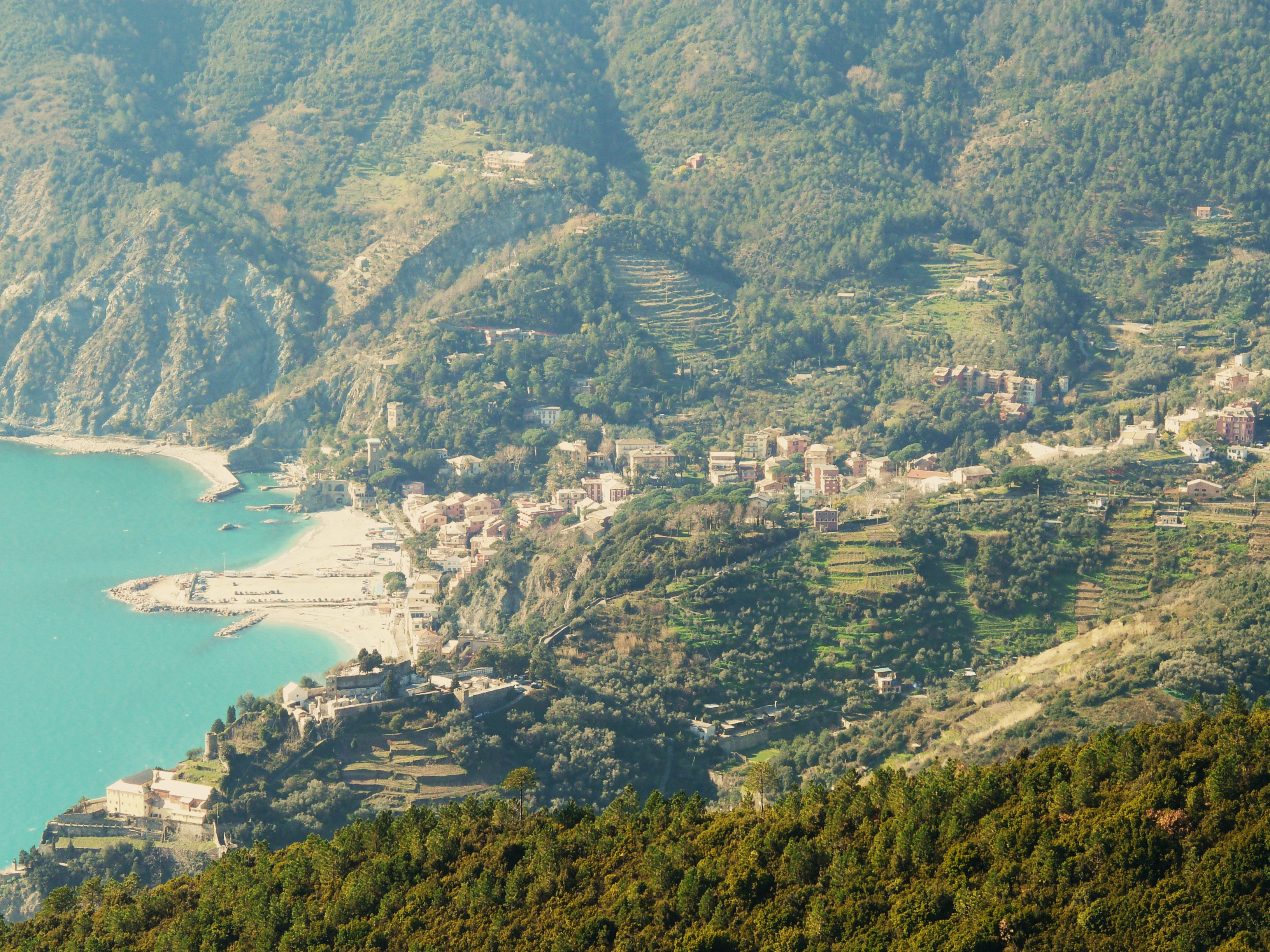 Panorama di Monterosso al Mare, Cinque Terre, La Spezia, Liguria, Italia